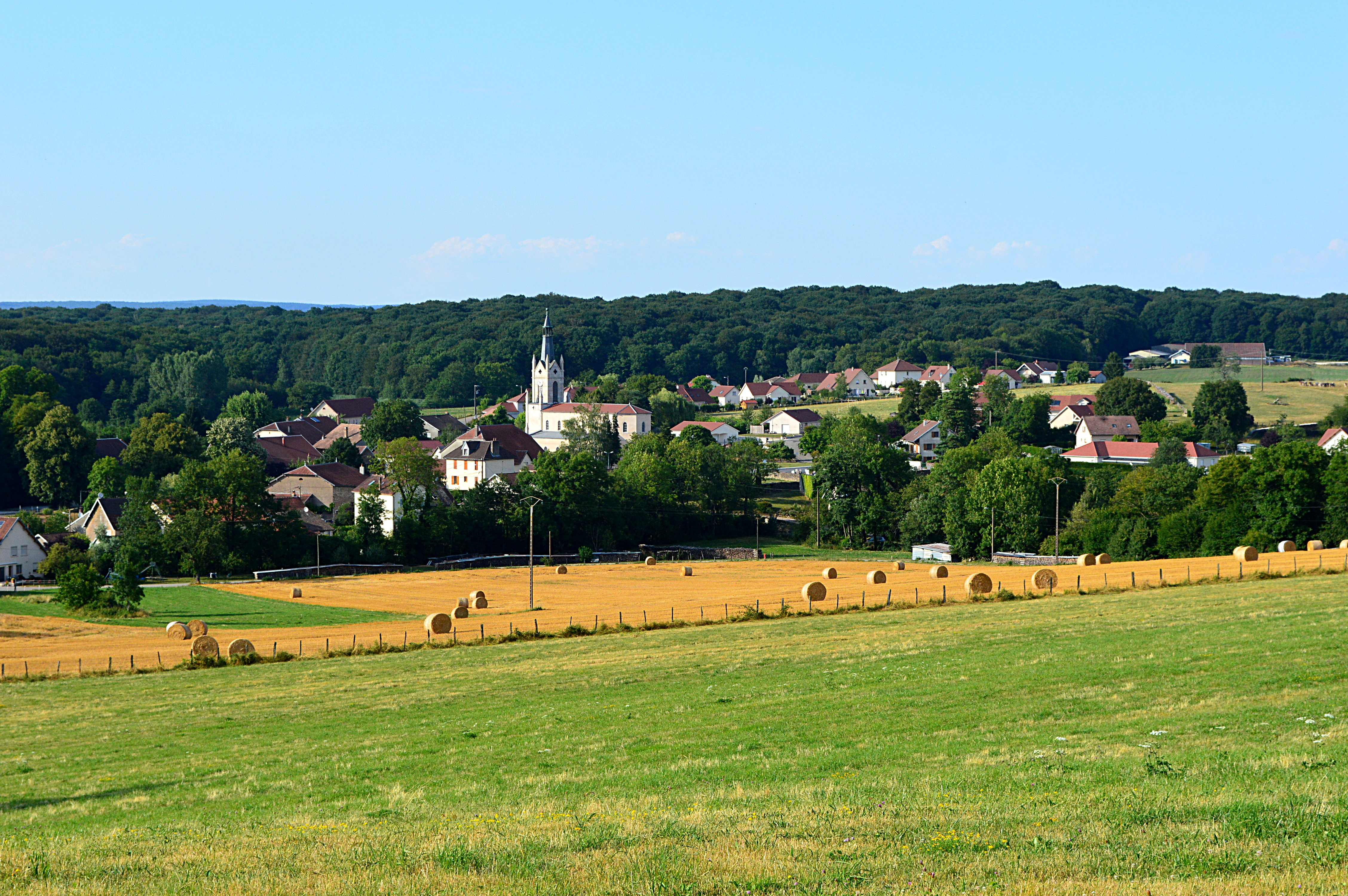 Vue générale d'une partie du village de Noironte, depuis les Prés du Pont, au sud de la commune, durant l'été 2018. A centre, on distingue l'église Saint-Martin, et en arrière-plan le Bois des Fouchères.